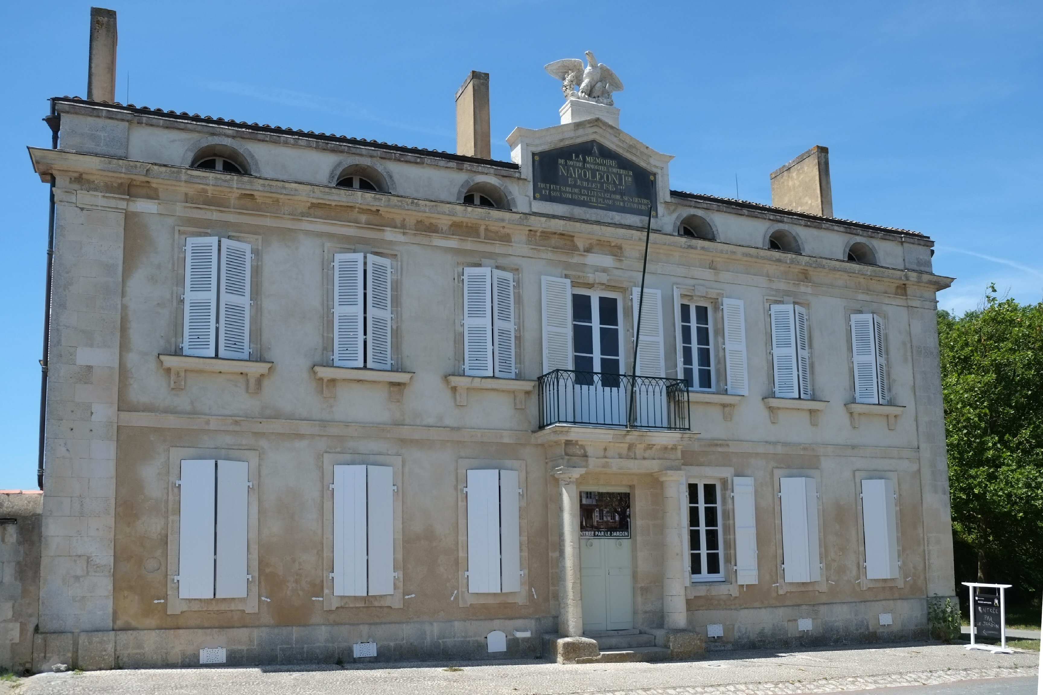 Maison de l'Empereur Musée napoléonien Île d'Aix Charente-Maritime France .